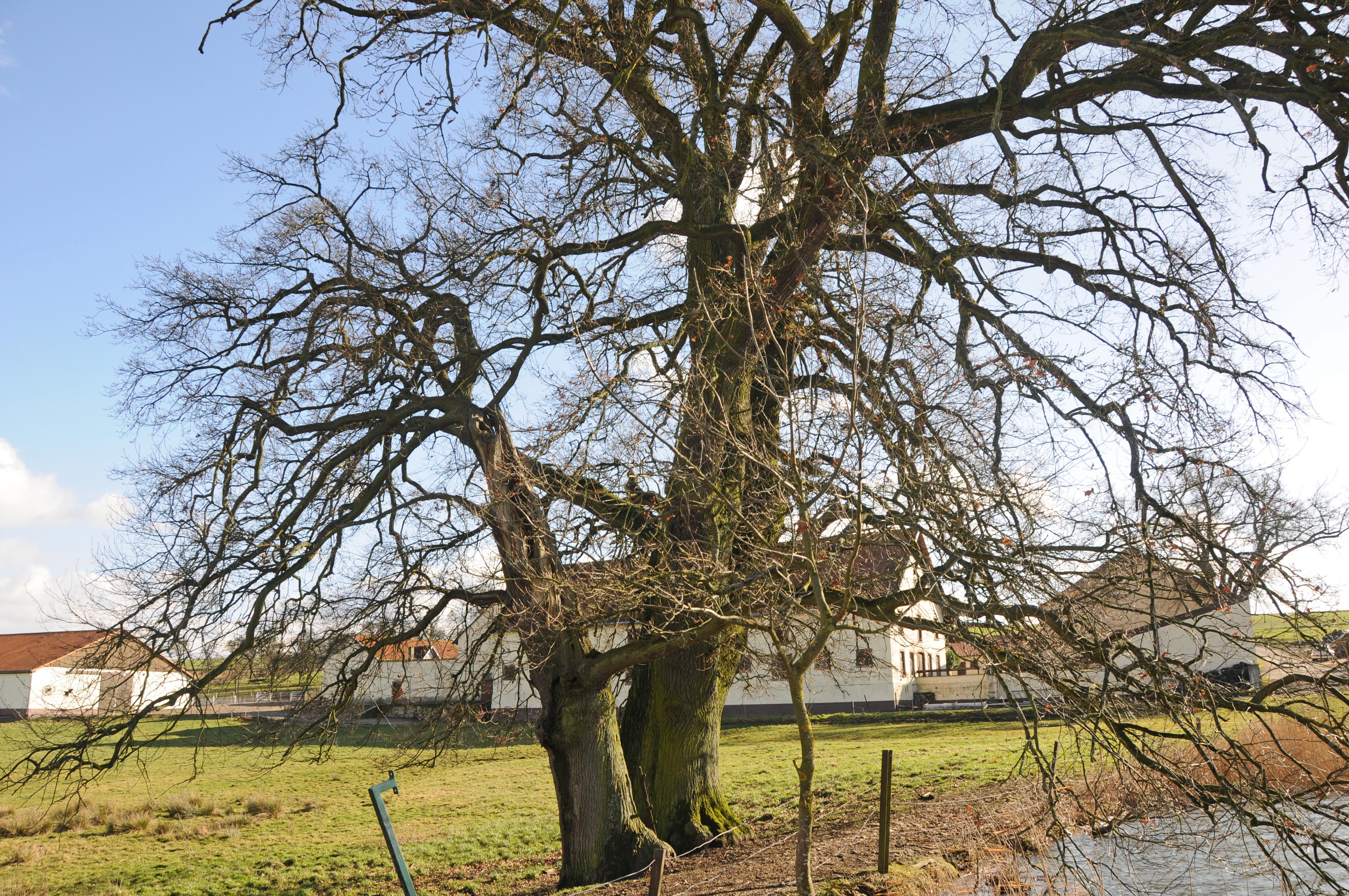 Eechen um Pläitrengerhaff.